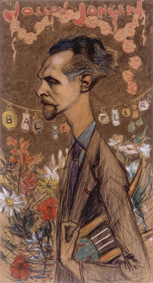 Représentation de Joseph Jongen par Georges Jamotte. Fusain et pastel sur carton. L'oeuvre originale est conservée au Conservatoire royal de Bruxelles